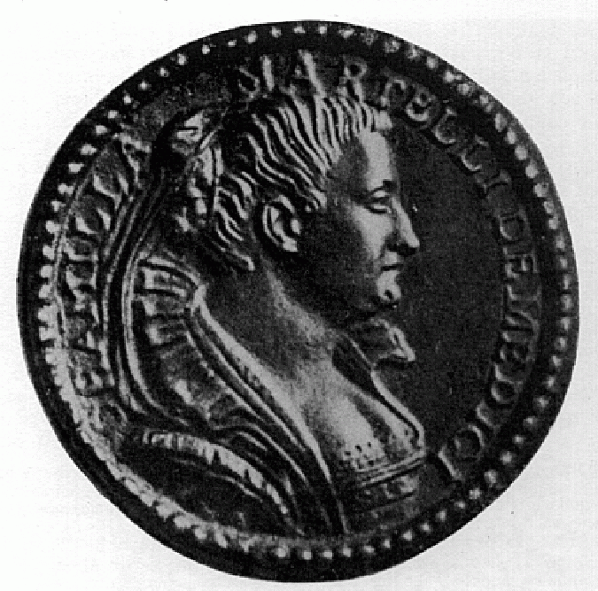 Camilla Martelli, medal attributed to Pastorino de’ Pastorini (1508-92), perhaps executed after Martelli’s death in 1590